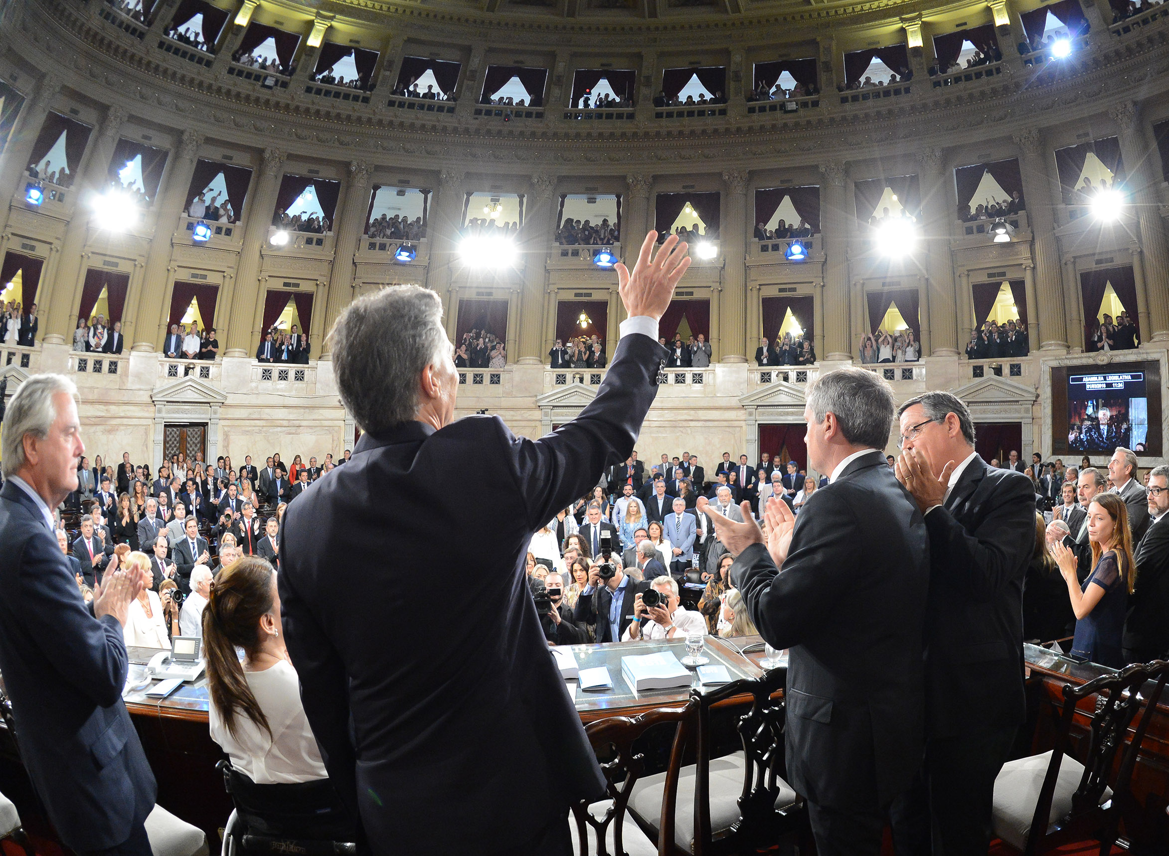 Macri habló ante la asamblea legislativa